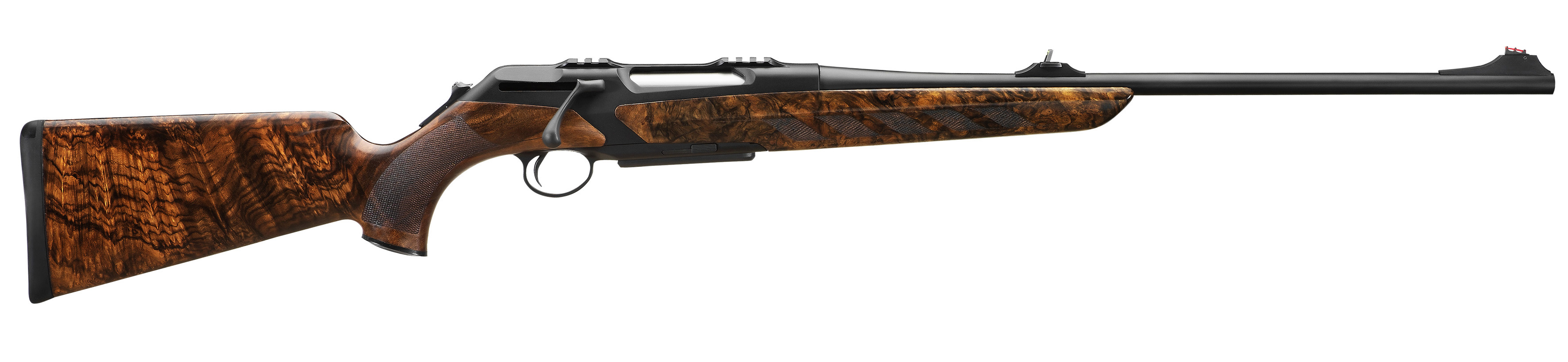 Merkel RX Helix Bolt Action